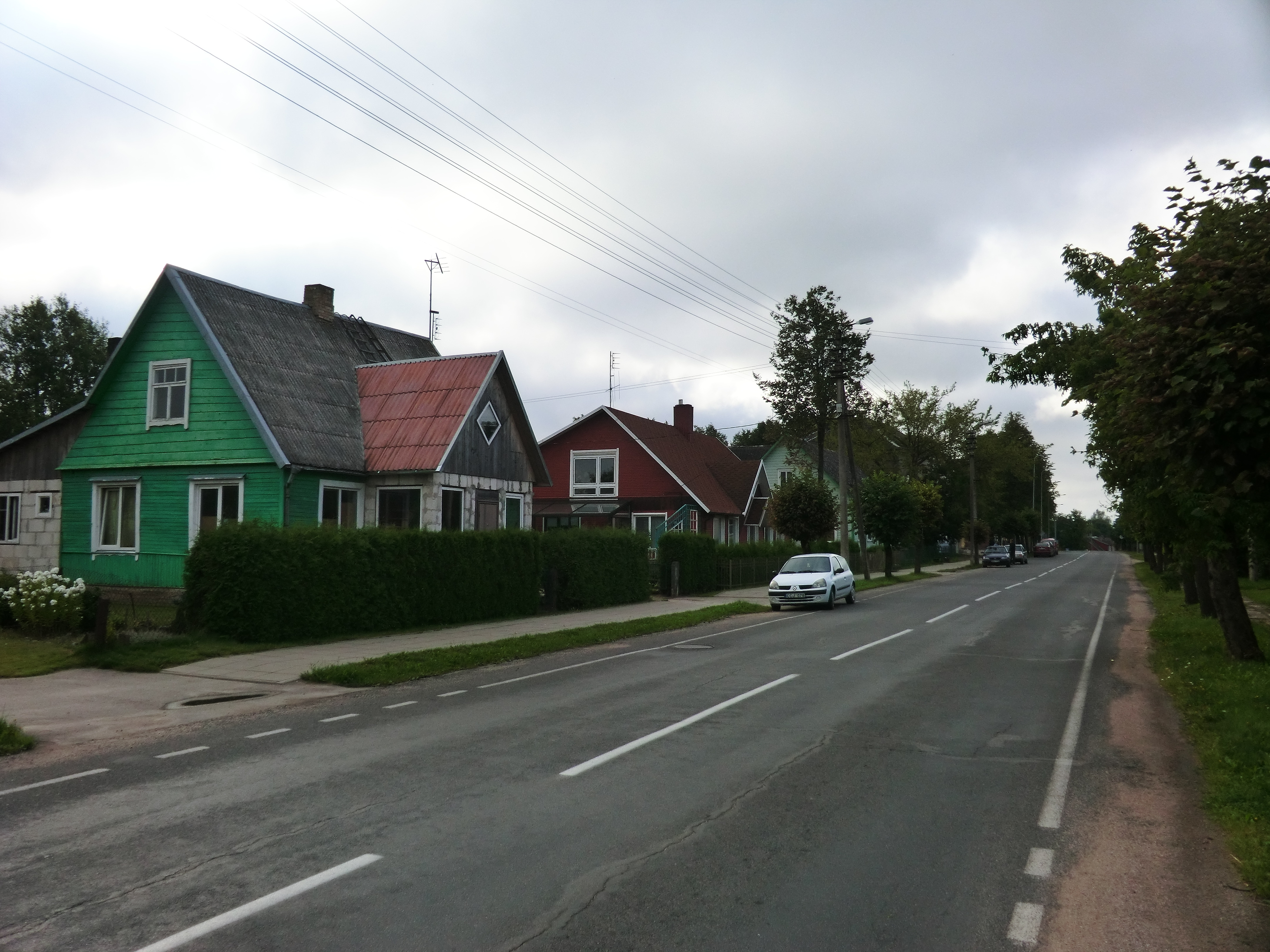 Панделис